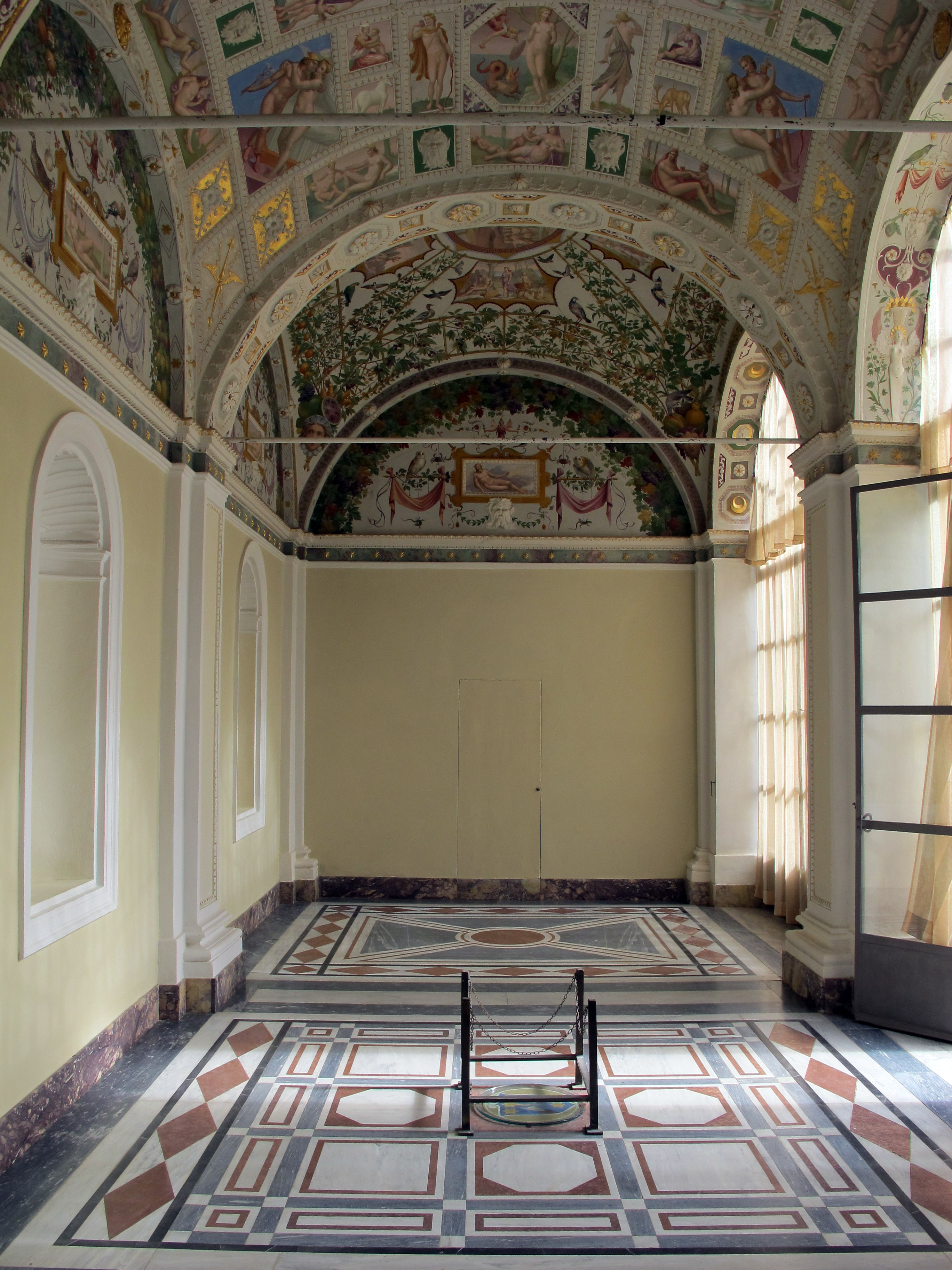 Castello di Belcaro - Siena